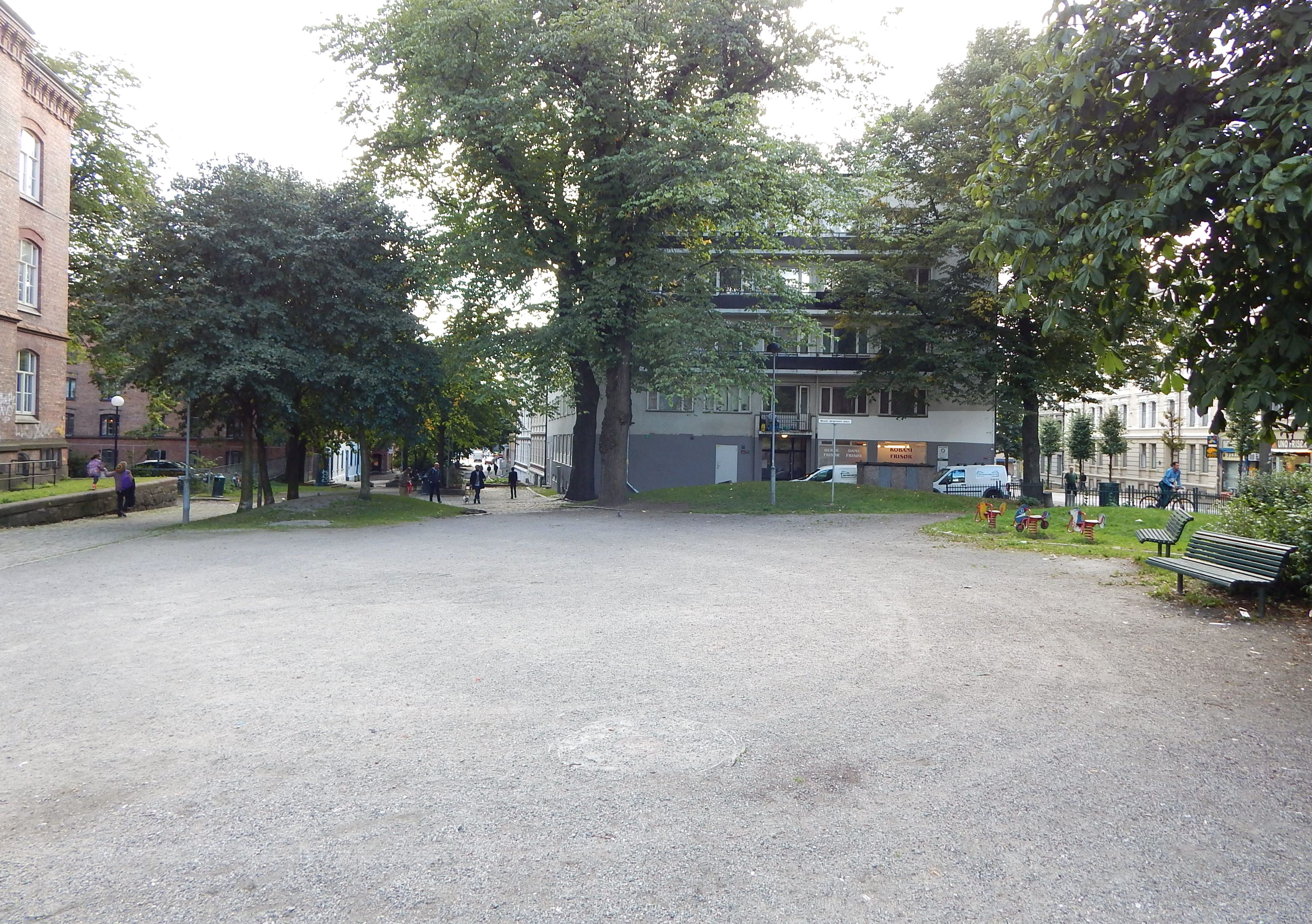 Mosse Jørgensens plass